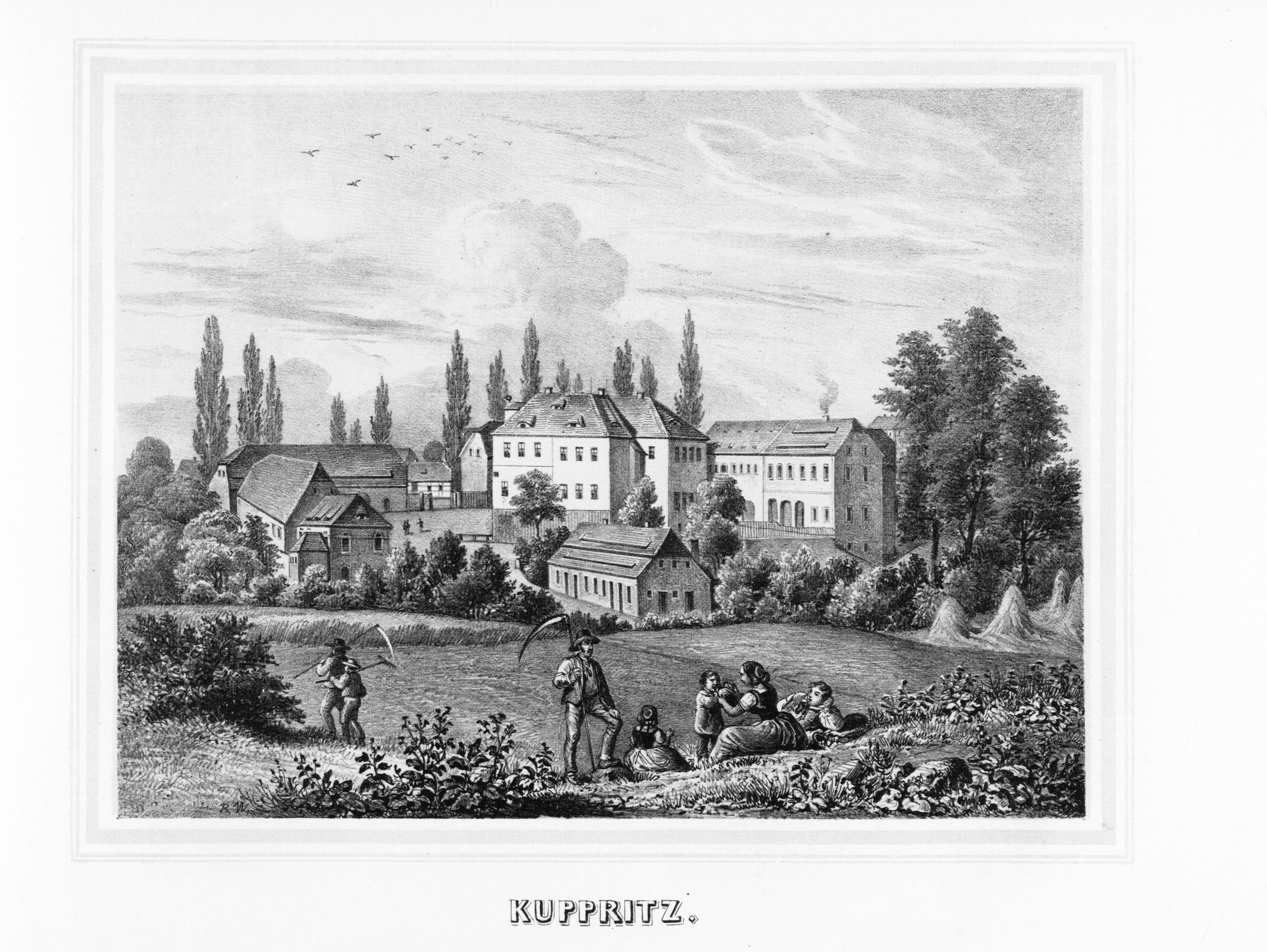 Kuppritz aus: Album der Rittergüter und Schlösser im Königreiche Sachsen Markgrafenthum Oberlausitz Section: III